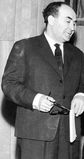 Српски (ћирилица): Љубиша Јовановић, југословенски позоришни и филмски глумац